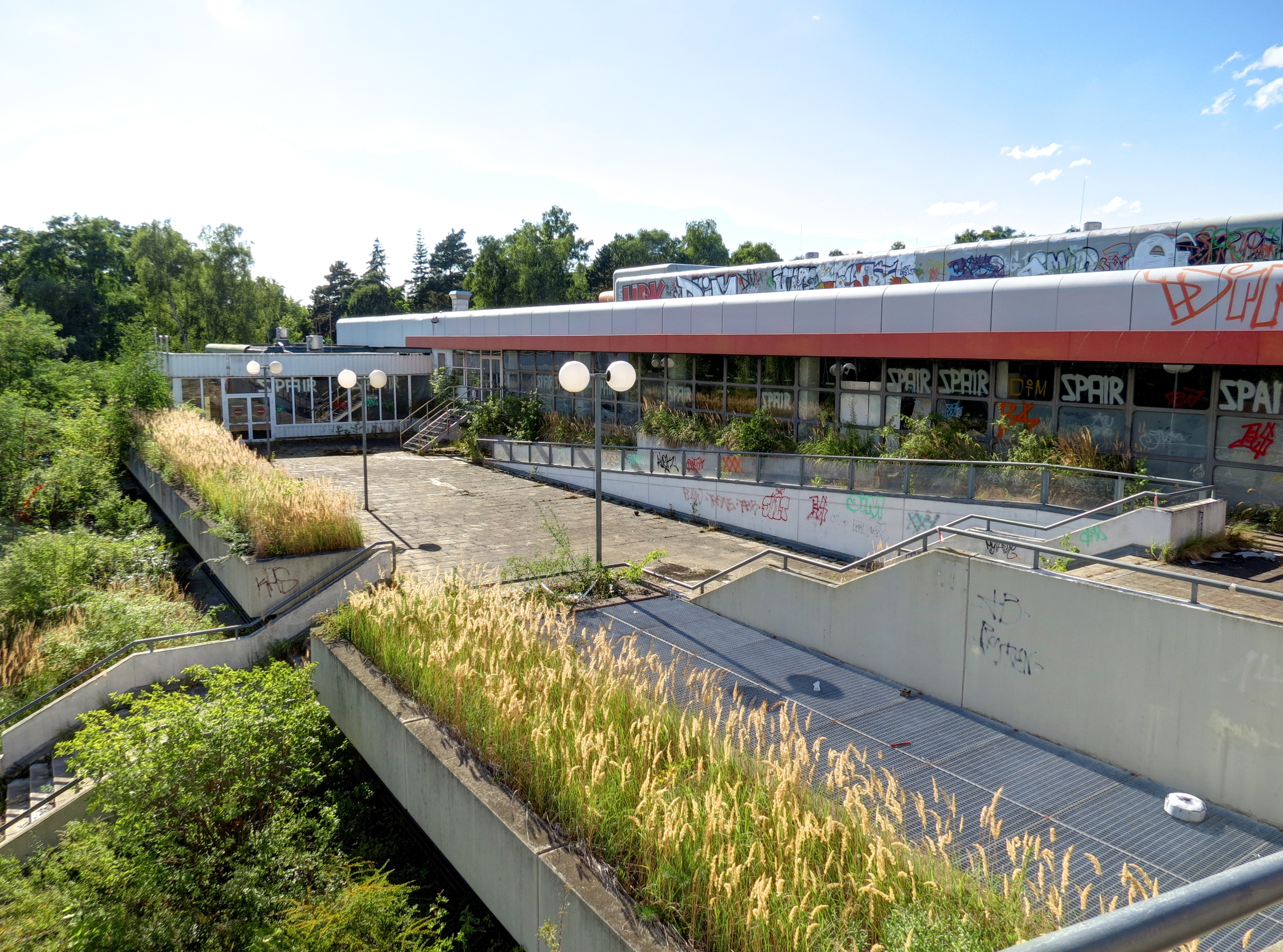 Avenue Charles de Gaulle 12